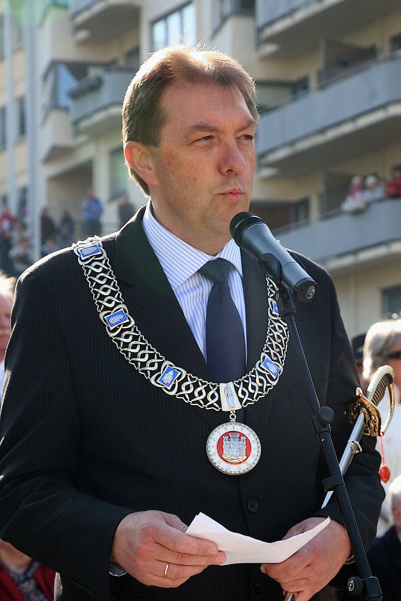 Gunnar Bakke, ordfører i Bergen (Frp)